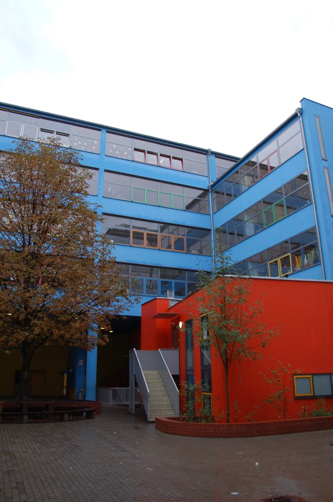 Neubau des Evangelischen Schulzentrum Leipzig